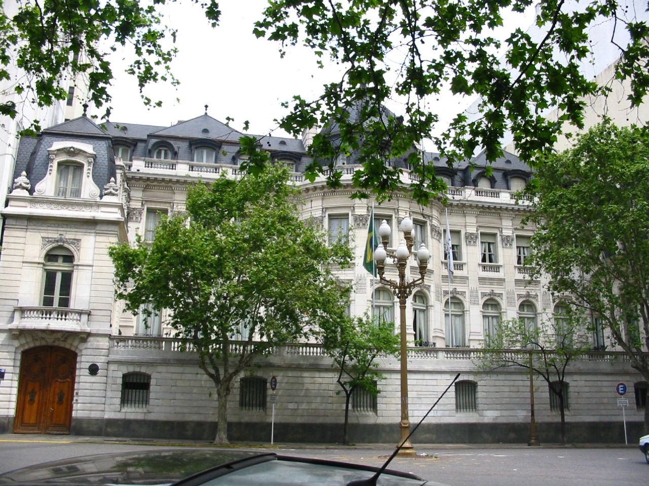 Sede da Embaixada do Brasil em Buenos Aires. Calle Arroyo 1130, barrio Retiro, Buenos Aires.